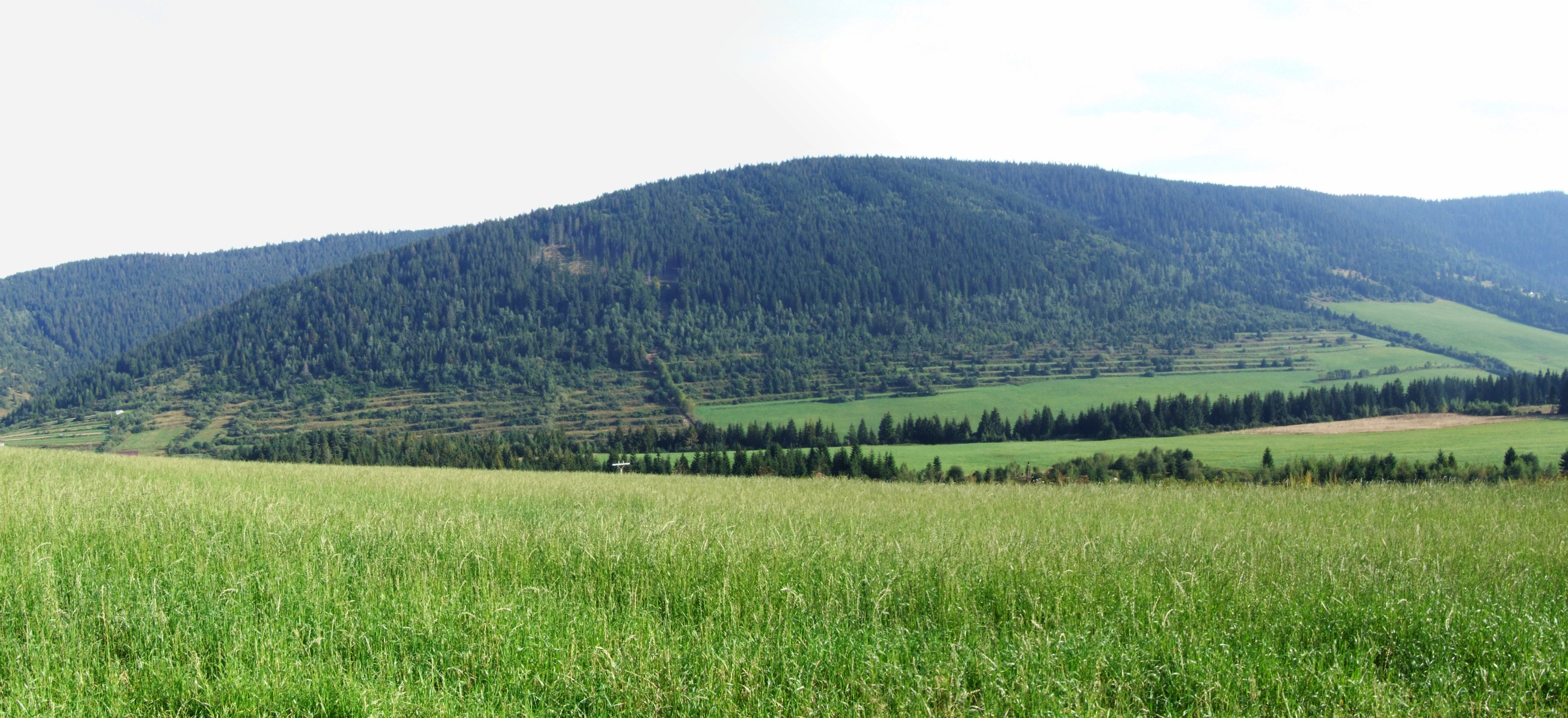 Javorková (Skoruszyńskie Wierchy). Widok z wzgórza Chotár (Zuberec)